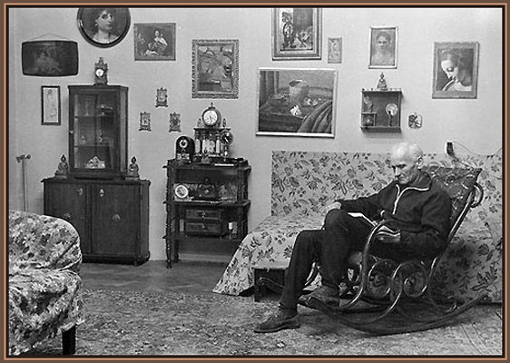 Idősebb Benedek Jenő (Kecskemét, 1906. január 16. – Budapest, 1987. július 19.) magyar festő otthonában, a budapesti Béla király úton, 1970 körül